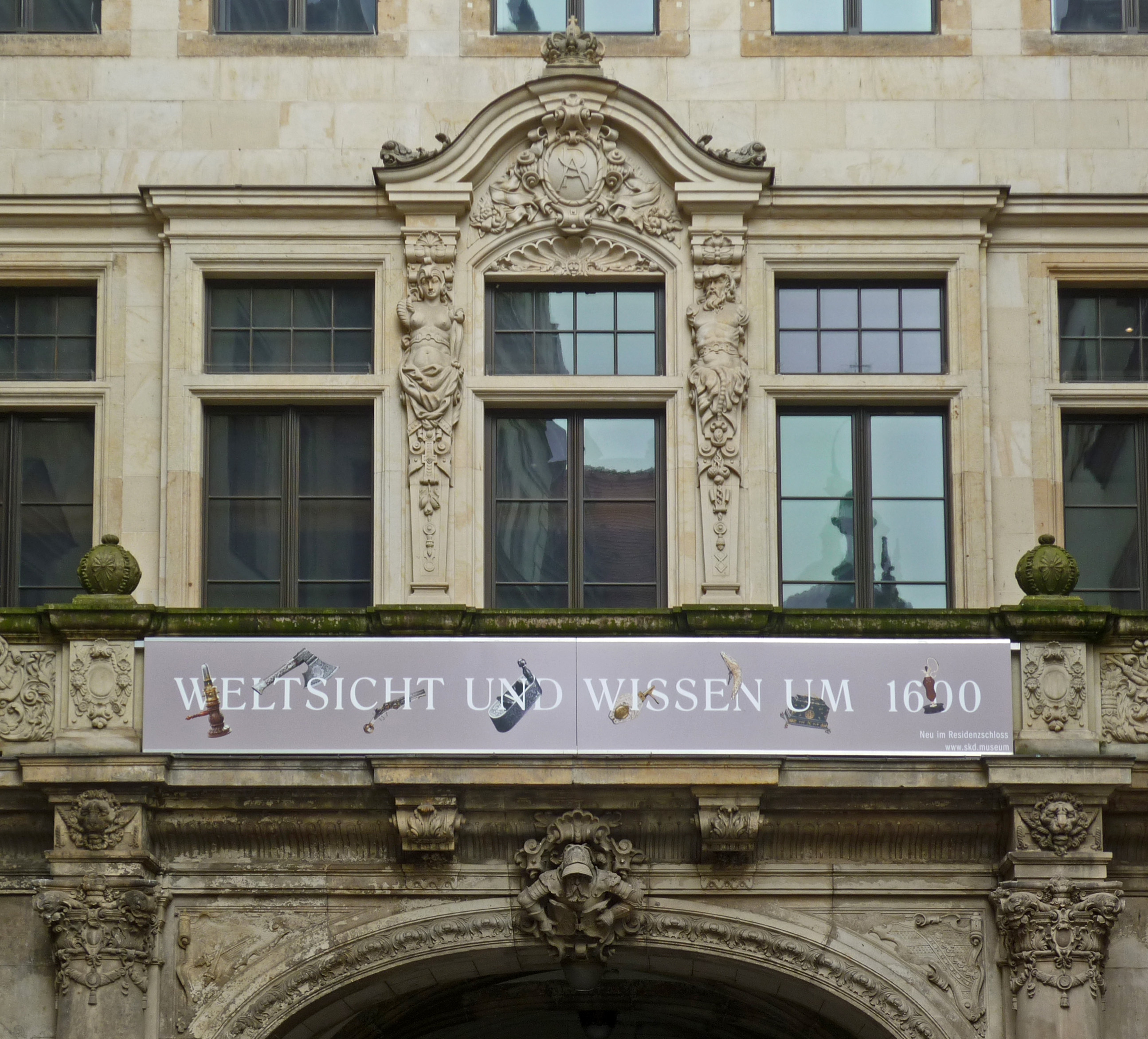 "Weltsicht und Wissen um 1600" ist eine Dauerausstellung der SKD im Residenzschloss in Dresden